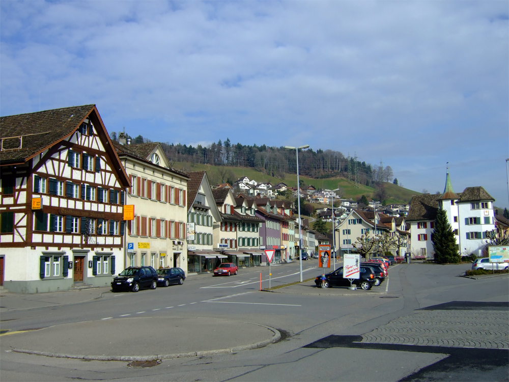 Zentrum des Dorfes Schmerikon, Kanton St. Gallen, Schweiz